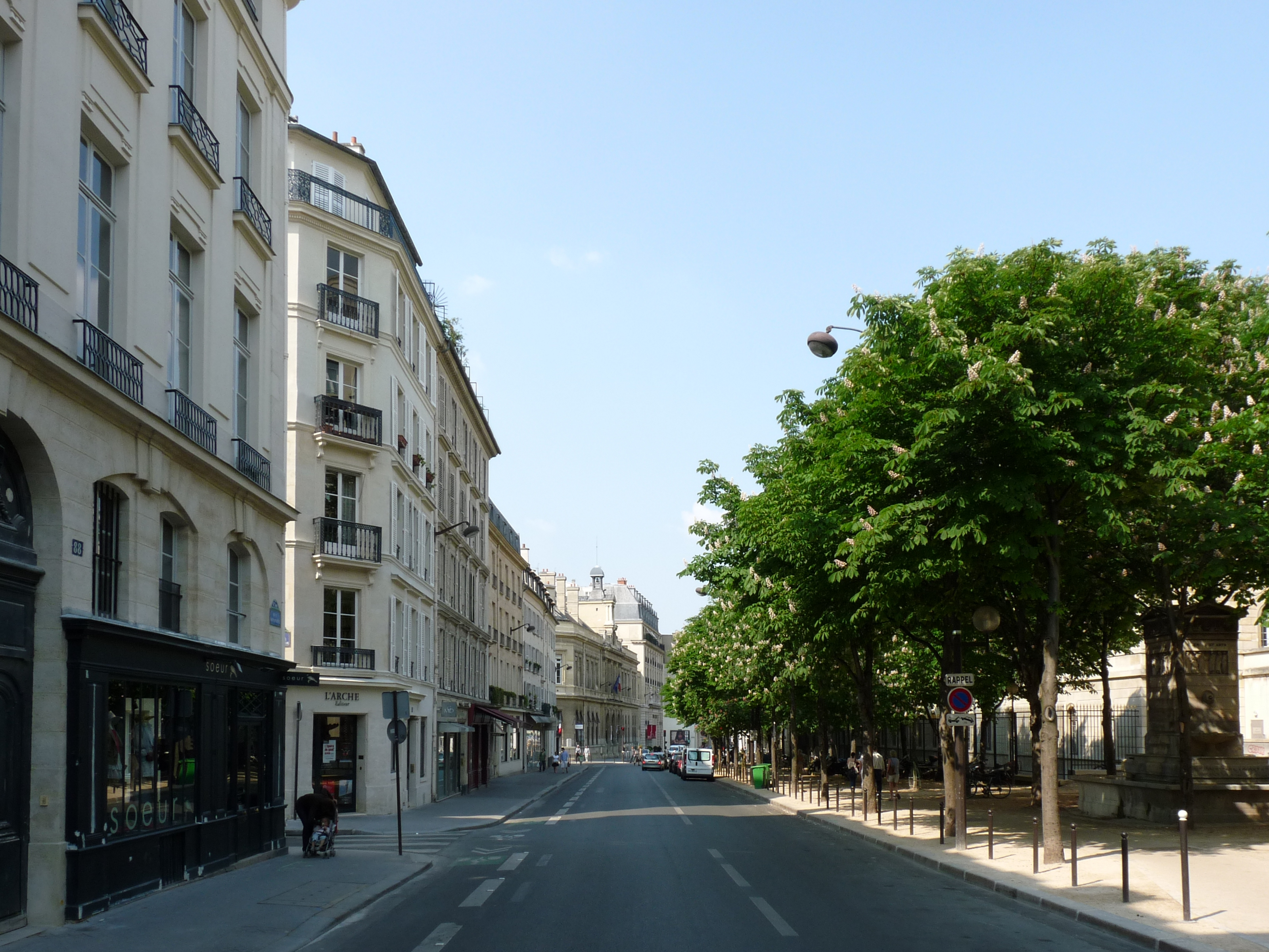 La rue Bonaparte à Paris, vue vers le nord depuis la rue de Vaugirard